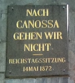 Canossasäule Bad Harzburg, Inschrifttafel mit Bismarckzitat "Nach Canossa gehen wir nicht - Reichstagssitzung 14. Mai 1872"